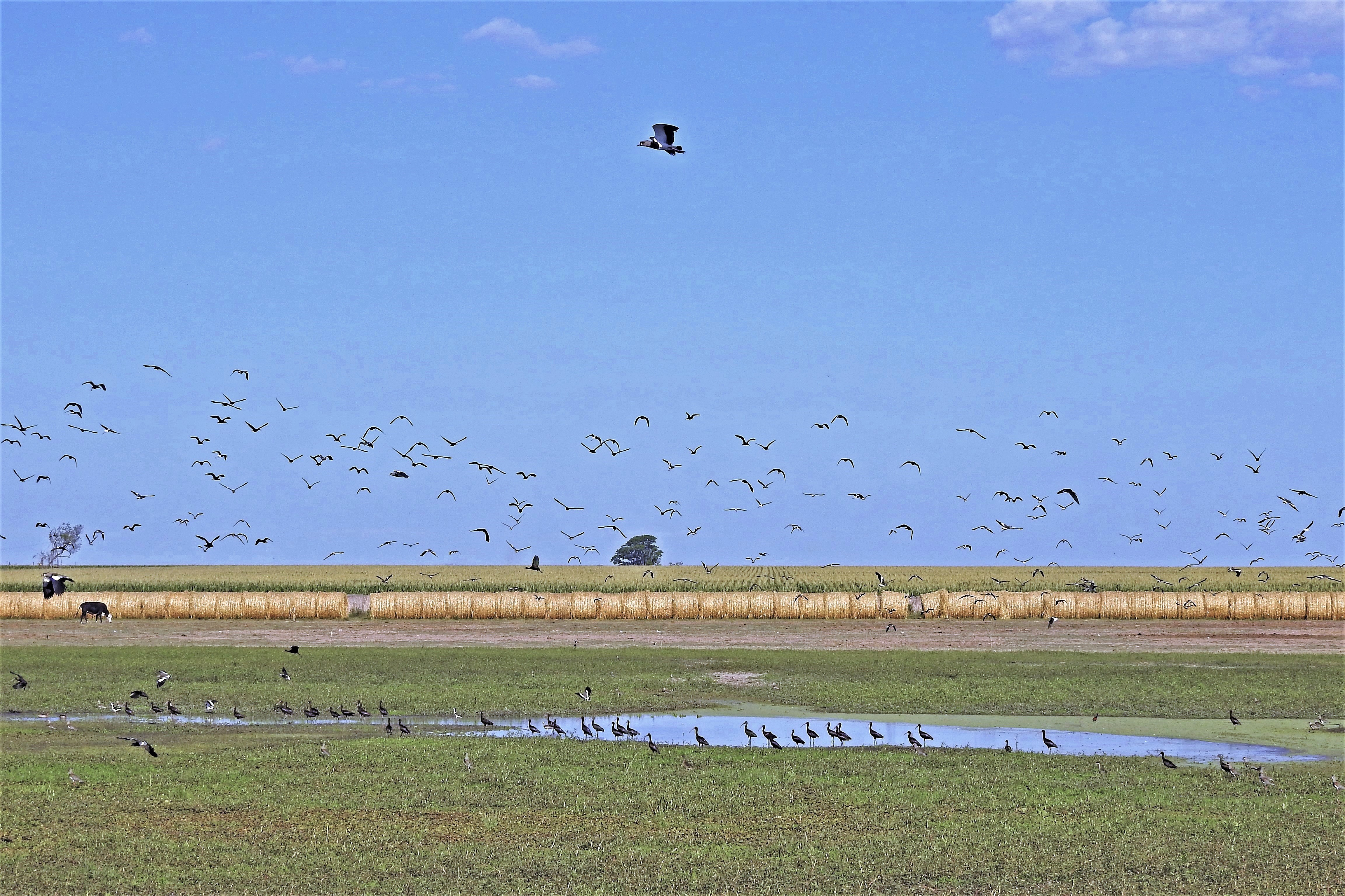 Testimonio gráfico de lo que queda de silvestre en los campos